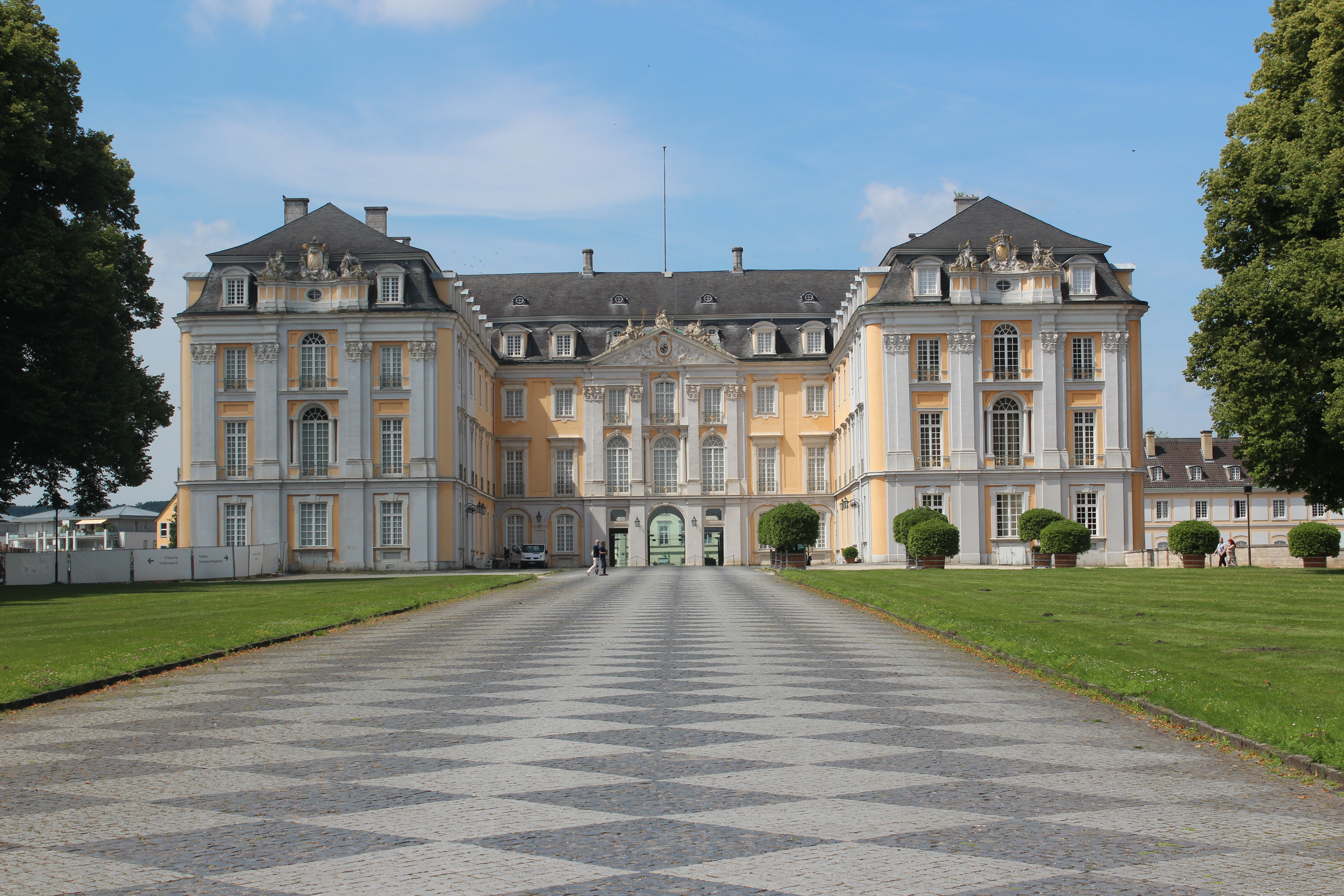 Schloss Augustusburg, Brühl